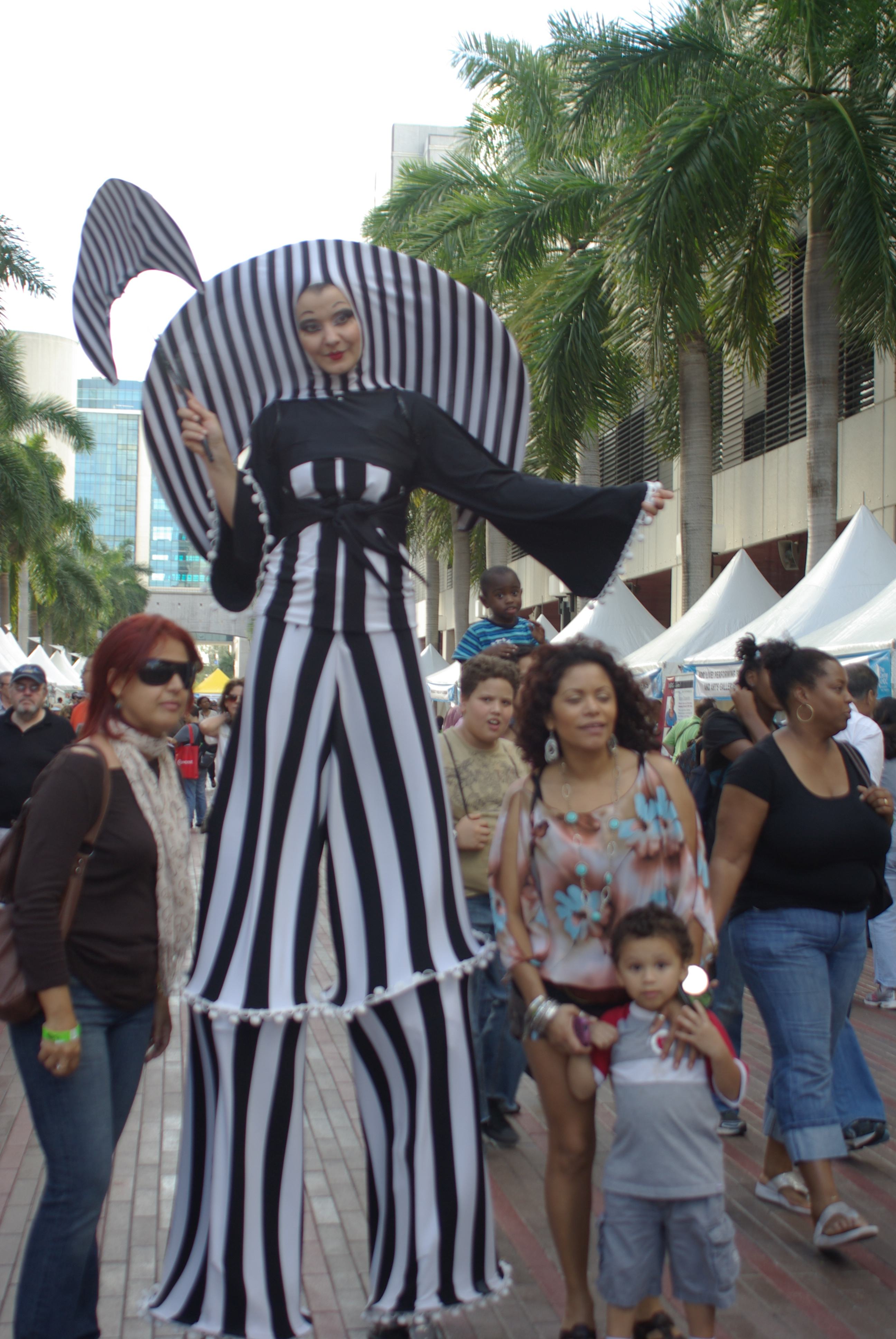 Feria Internacional de Miami, 2011